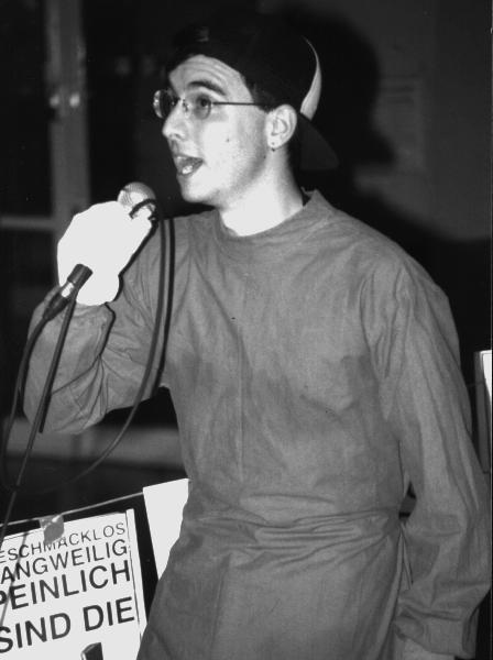 Mark Benecke 1993 als Mitglied der Band "Die Blonden Burschen"